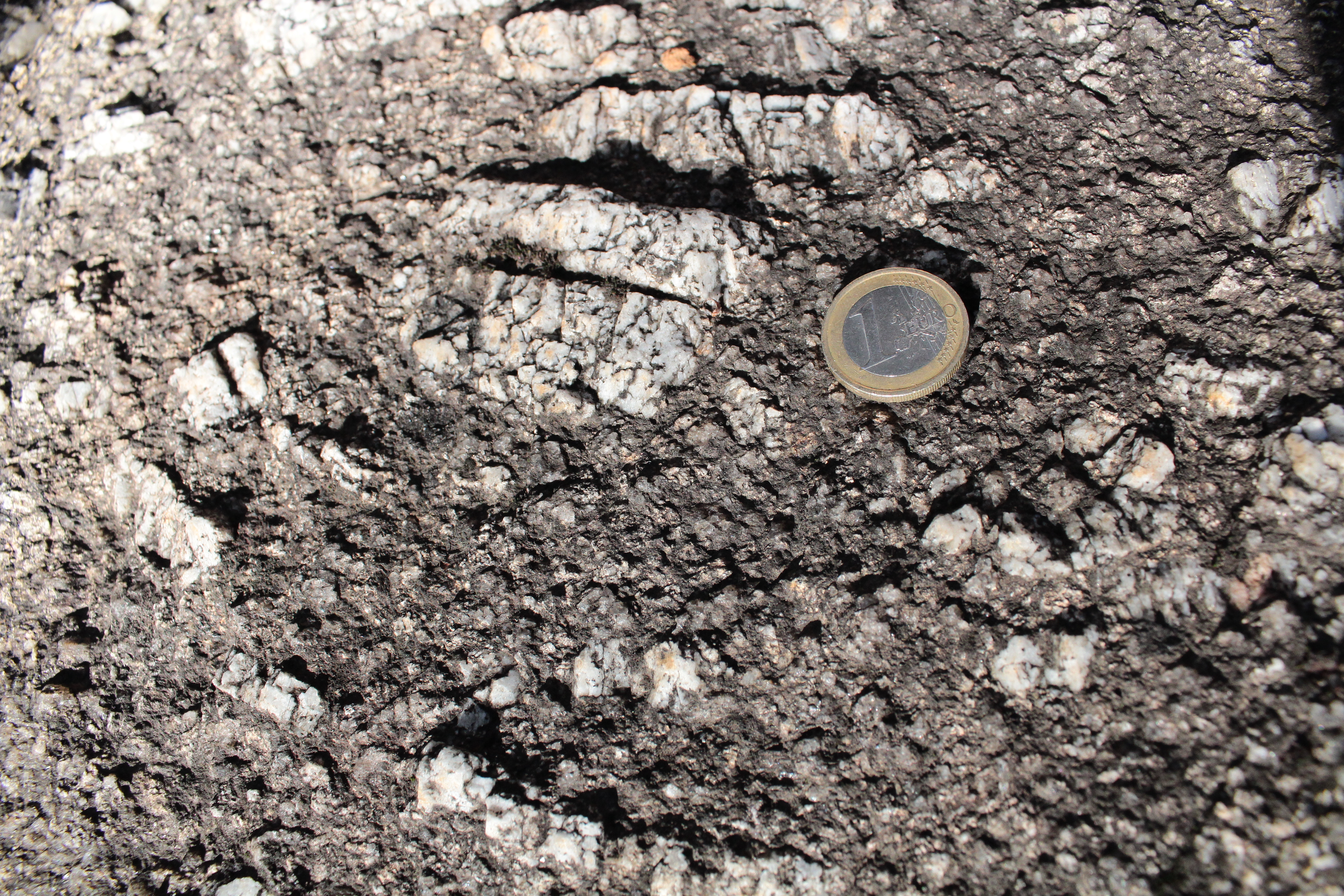 megacristais feldspato potásico